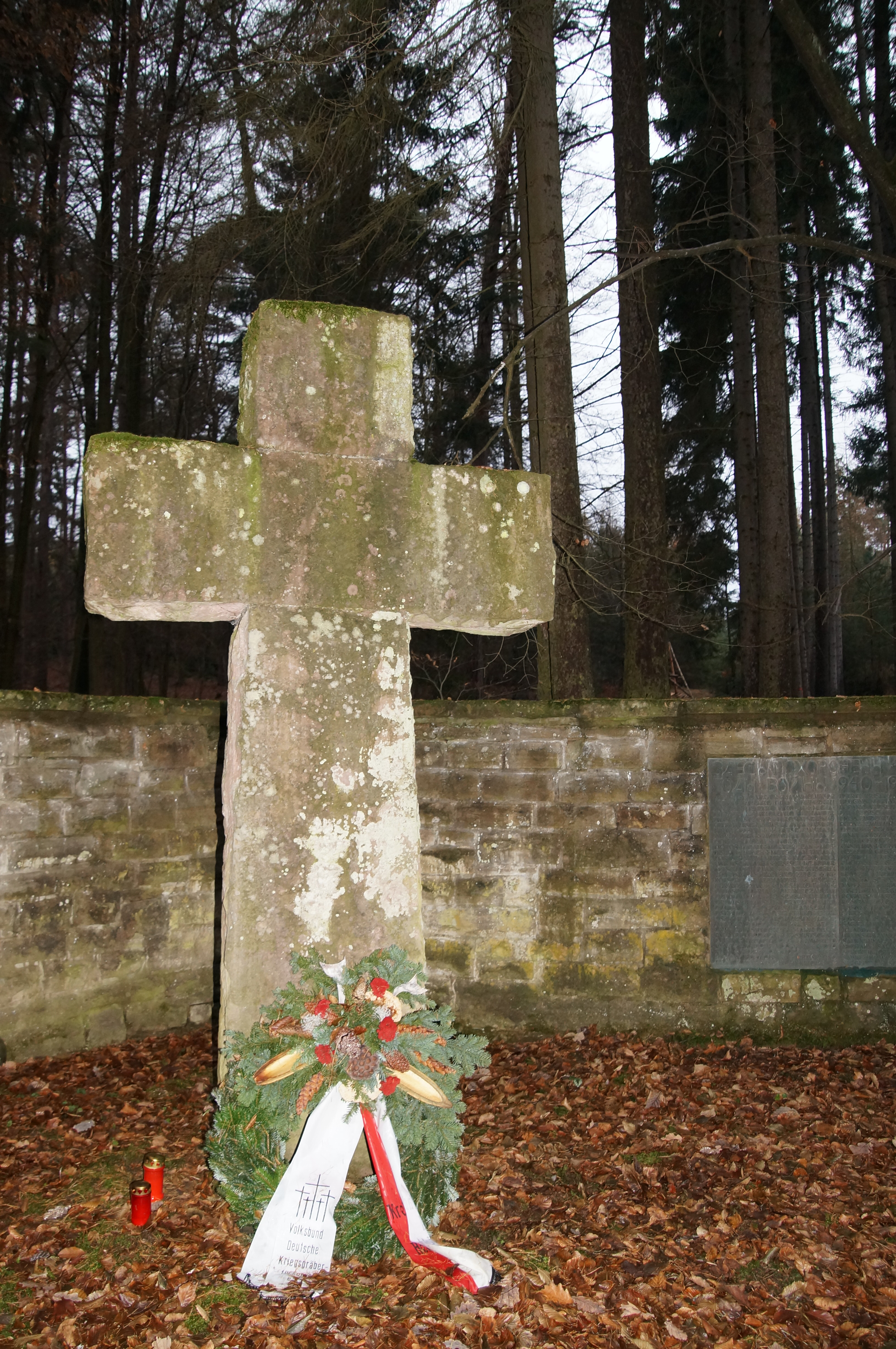 Gedendkkreuz Ehrenfriedhof Pfaffenwald